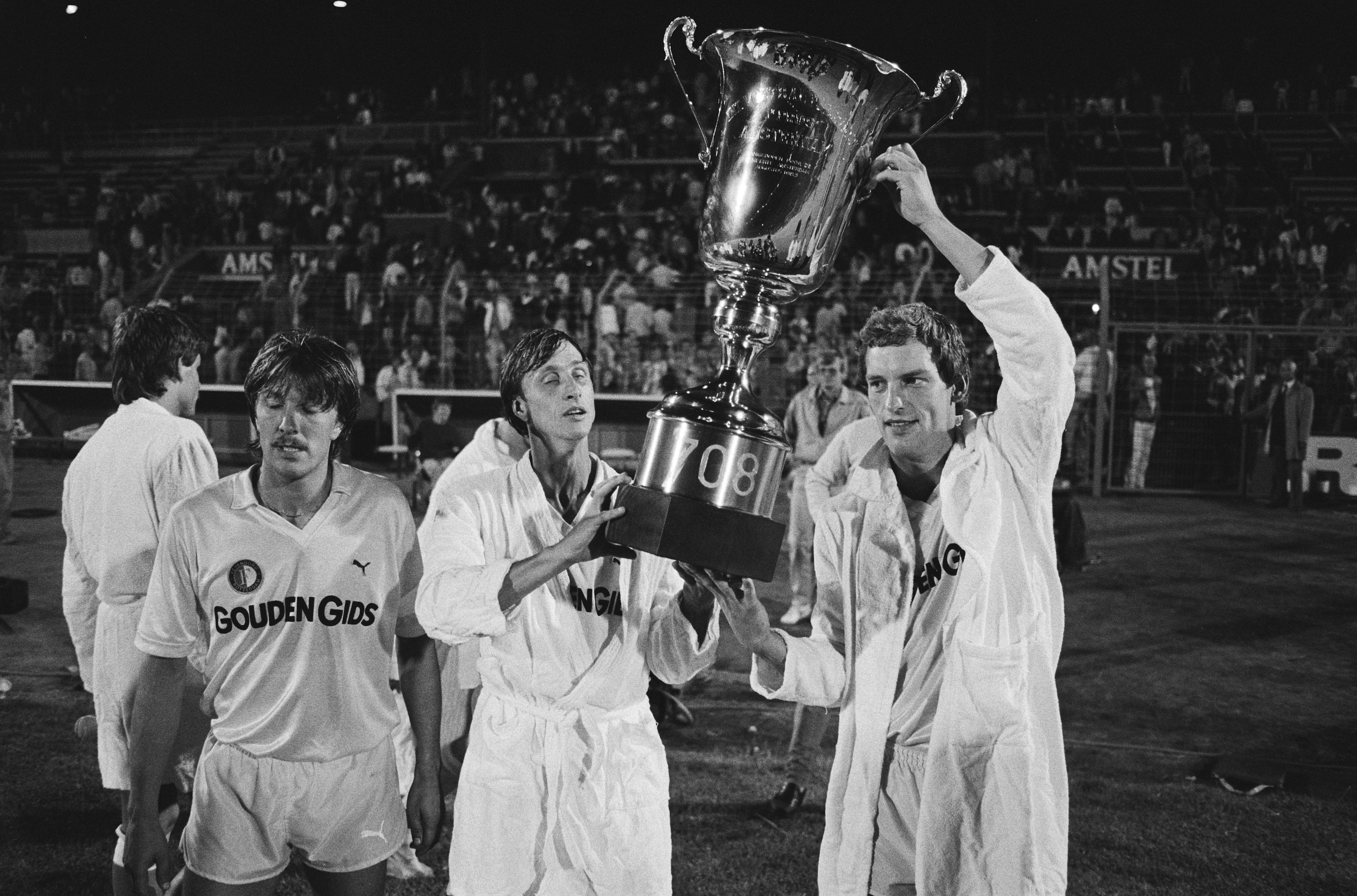 Collectie / Archief : Fotocollectie Anefo Reportage / Serie : Feyenoord winnaar van het Amsterdam 708-toernooi; Beschrijving : Johan Cruijff (l) en Vermeulen met de beker Datum : 14 augustus 1983 Locatie : Amsterdam, Noord-Holland Trefwoorden : sportprijzen, voetbal, wedstrijden Persoonsnaam : Cruijff, Johan Instellingsnaam : Feyenoord Fotograaf : Antonisse, Marcel / Anefo Auteursrechthebbende : Nationaal Archief Materiaalsoort : Negatief (zwart/wit) Nummer archiefinventaris : bekijk toegang 2.24.01.05 Bestanddeelnummer : 932-6659